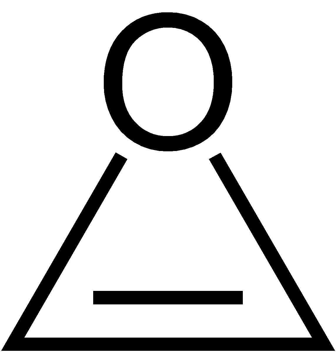 Struktur von Oxiren